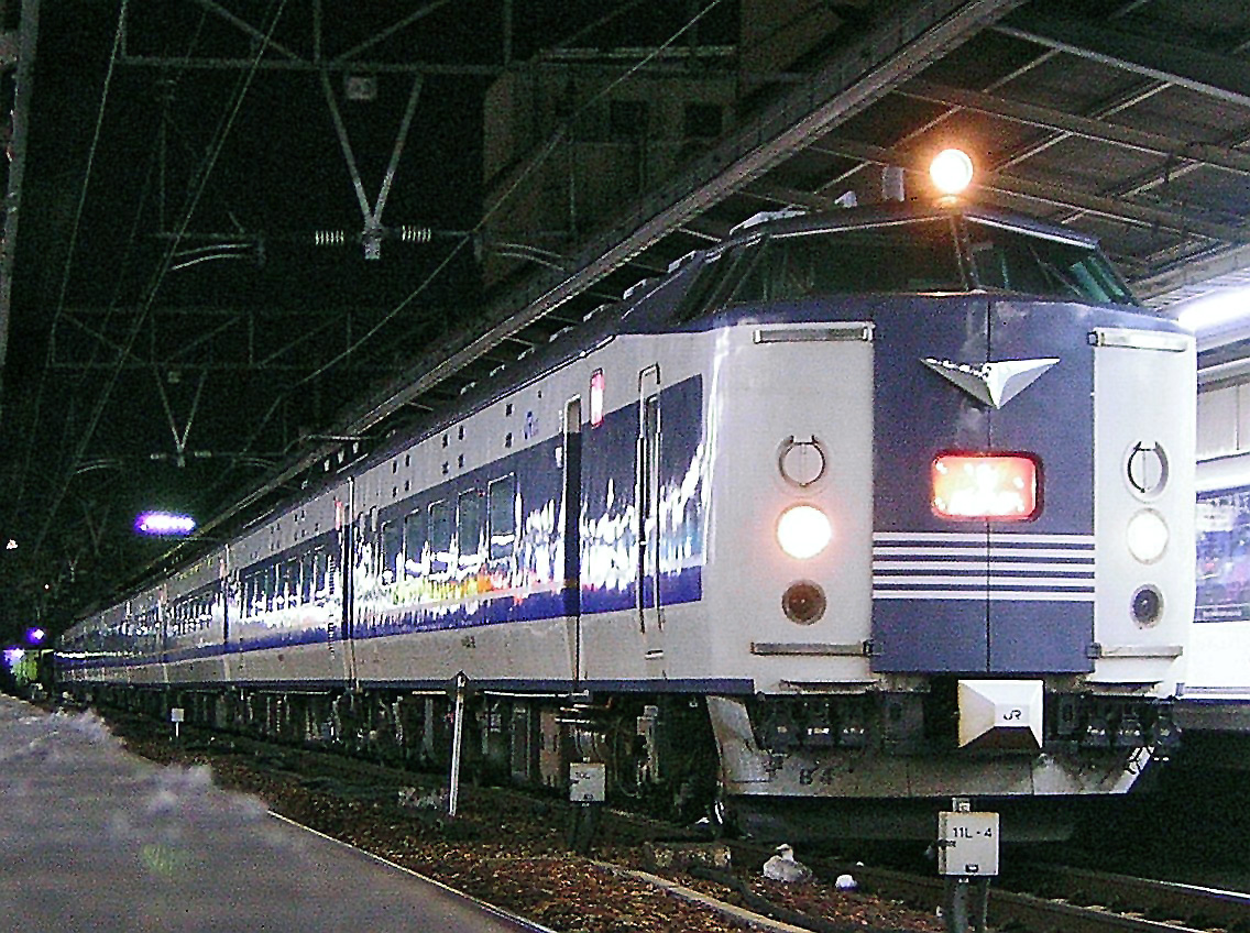 国鉄／JR西日本583系「シュプール号」大阪駅にて この年の運転を最後に廃止された。